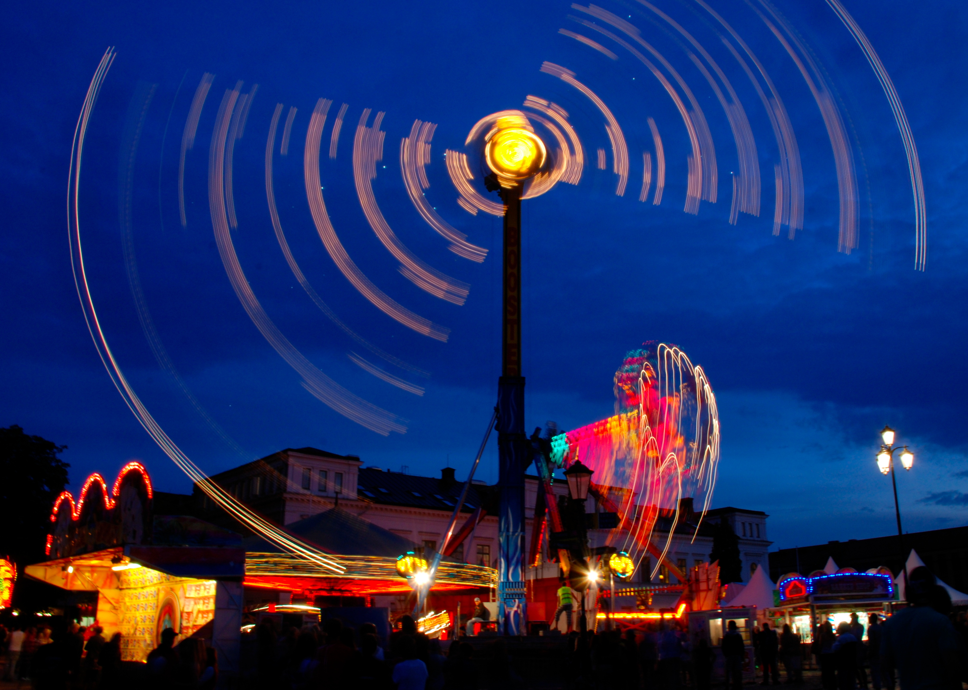 Axels Nöjesfält - Booster